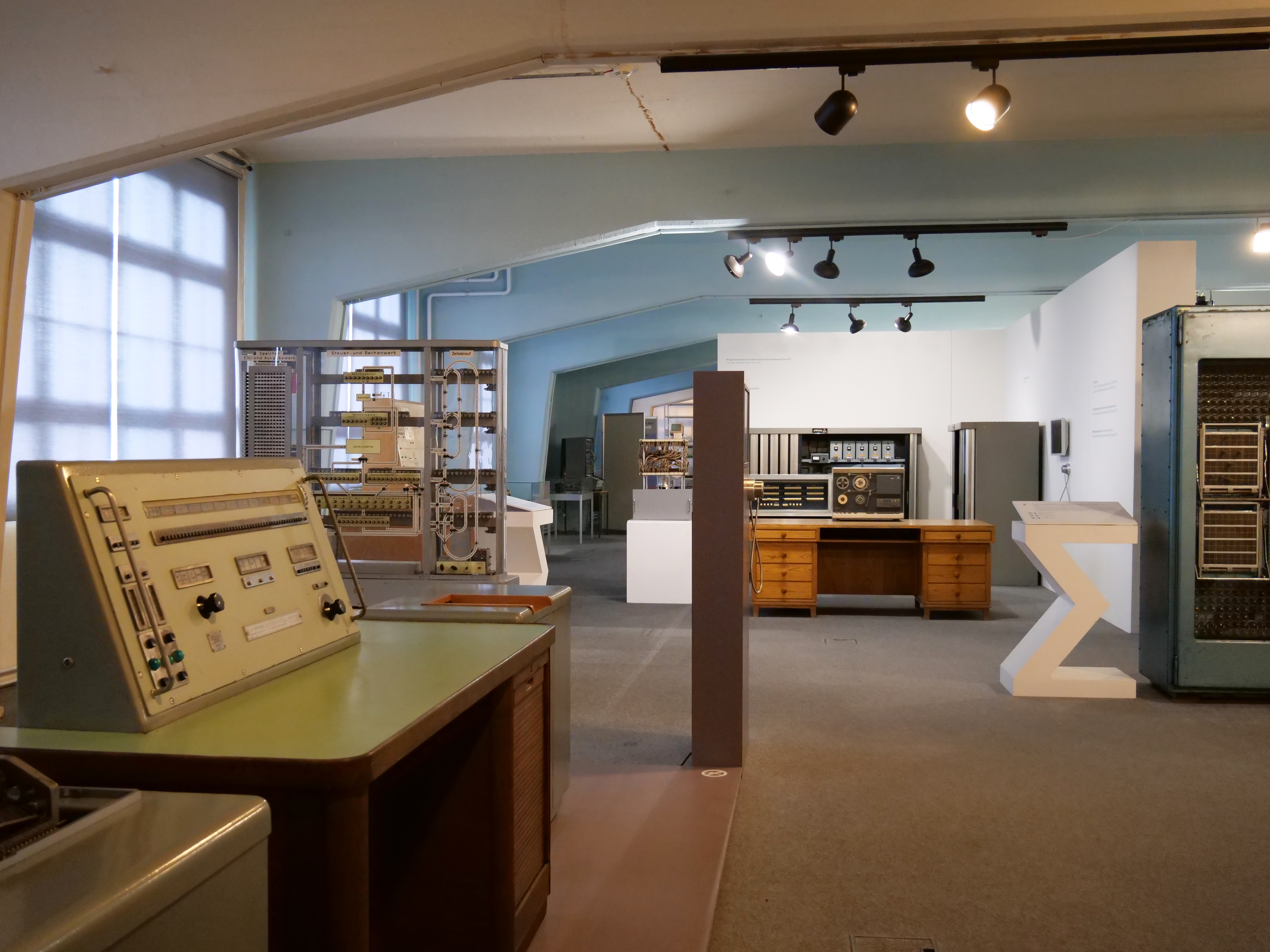 Blick in das Schaudepot Büro- und Rechentechnik der Technischen Sammlungen Dresden